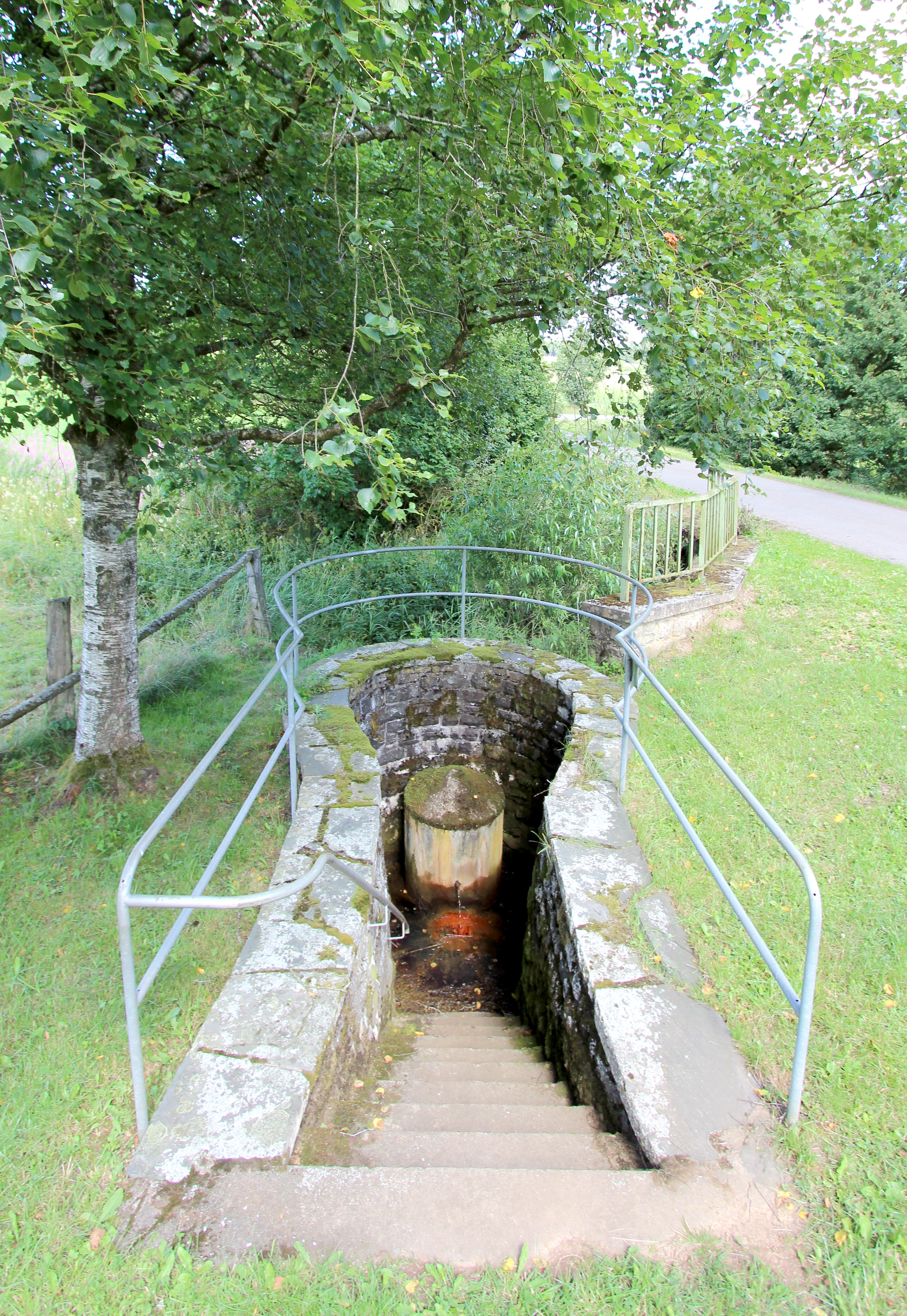 54597 Olzheim, nördlich vom Ort. Die natürliche Mineralquelle ist in 12 Gehminuten von der Kirche St. Brictius erreichbar. Aufnahme von 2017.